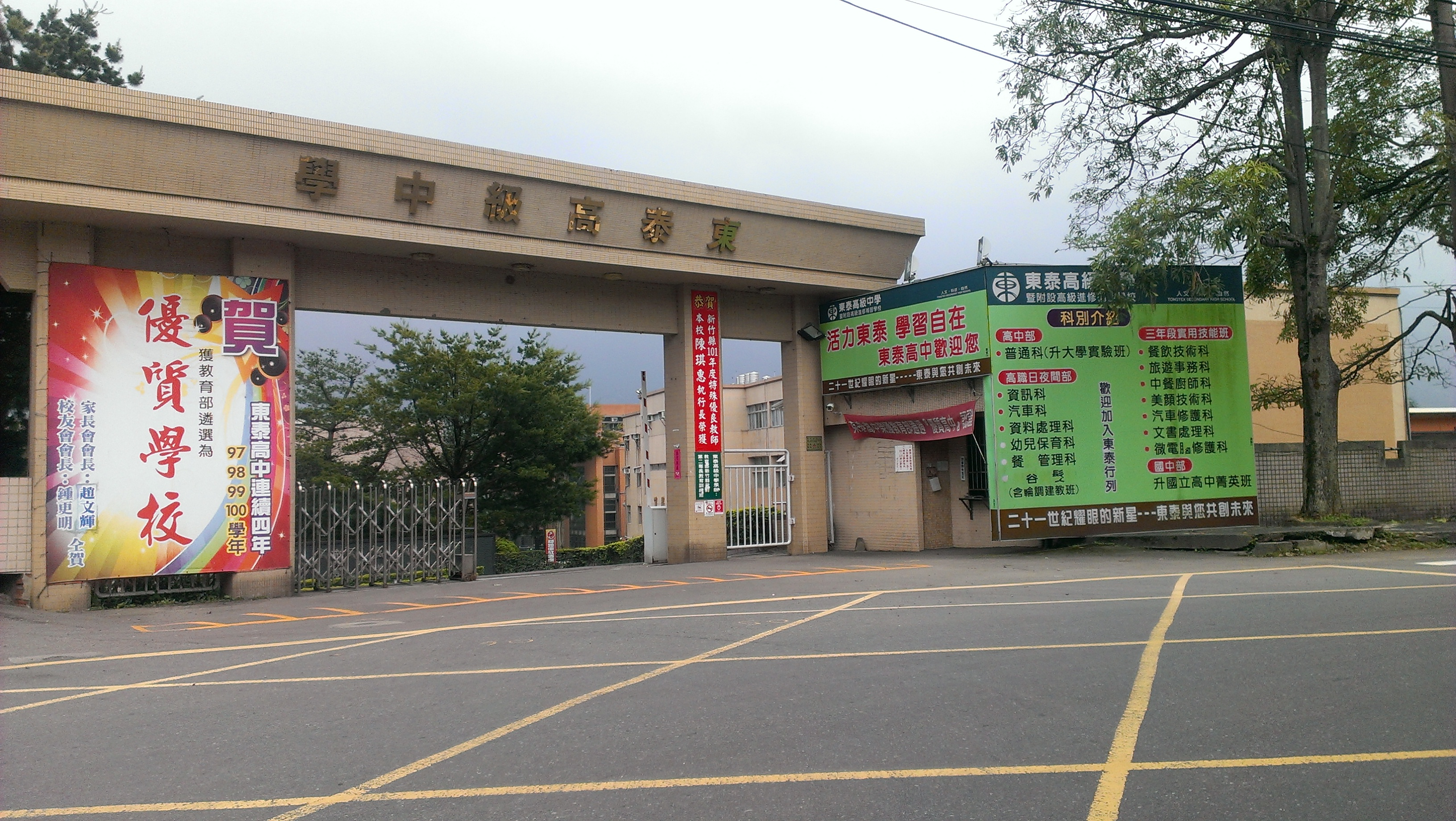 東泰高中正門口